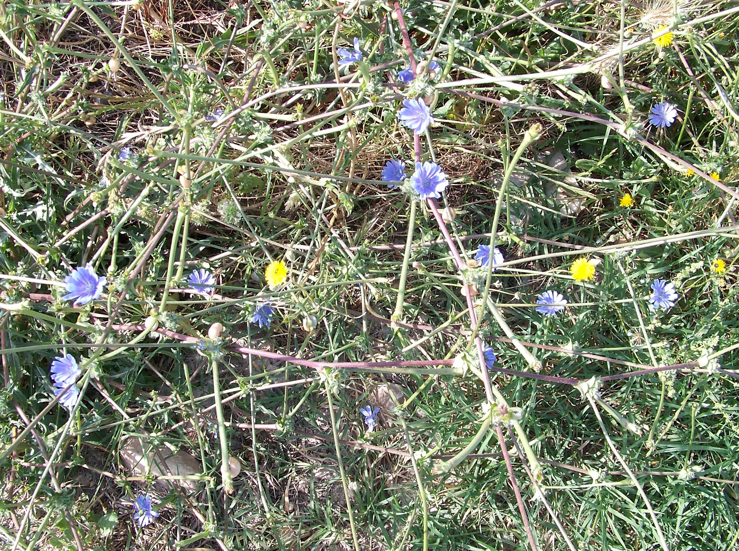 Cichorium intybus : Vista general - Camino de la Acequia de Cox, Albatera (Alicante, España).